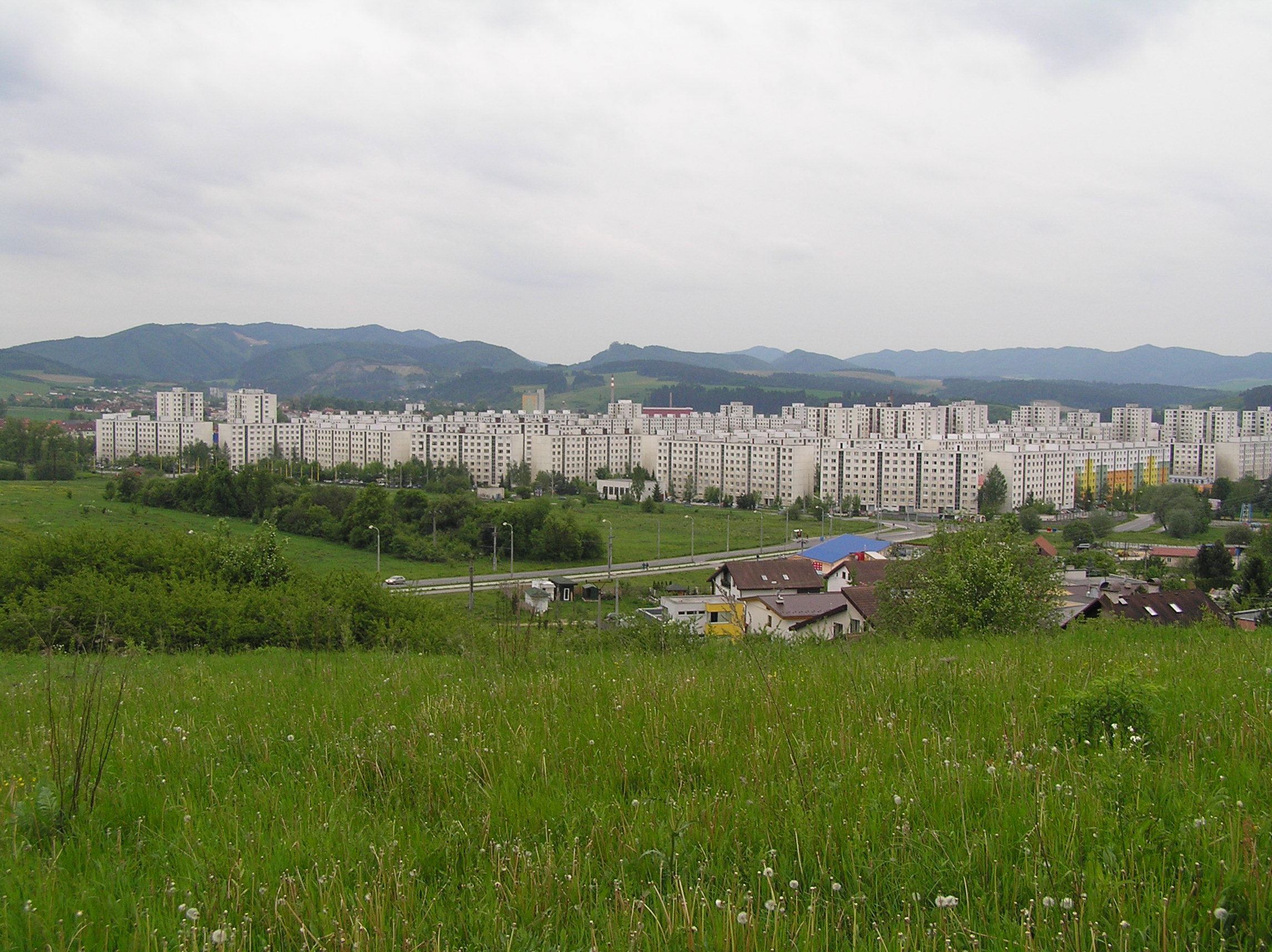 Žilina, pohľad z Veľkého dielu: sídlisko Solinky